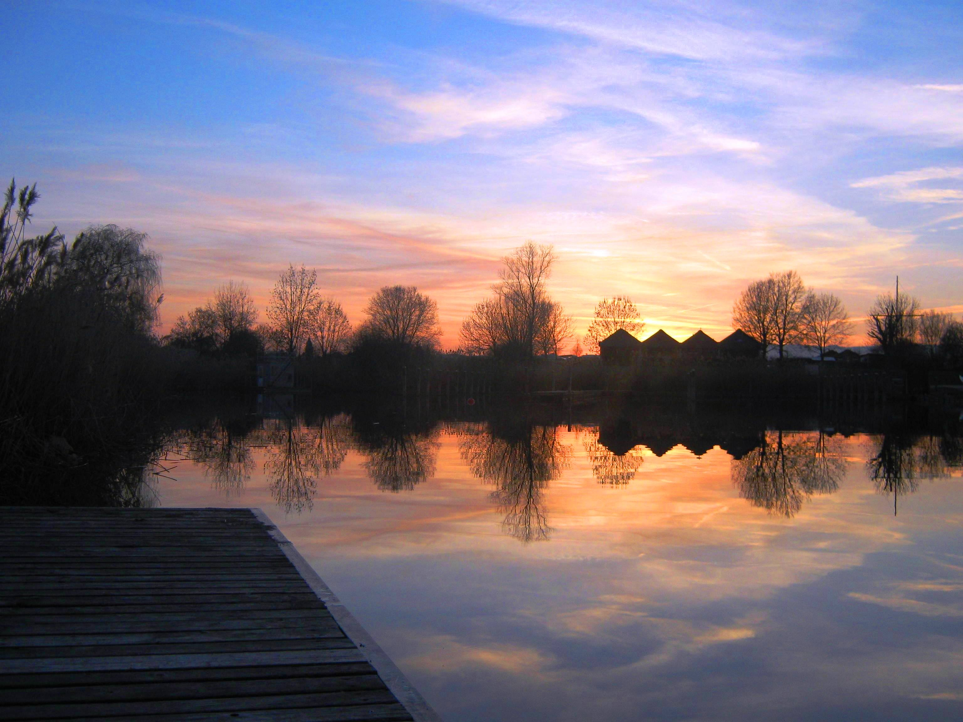 Sonnenuntergang am Werratalsee in Eschwege (Werra-Meißner-Kreis, Hessen)